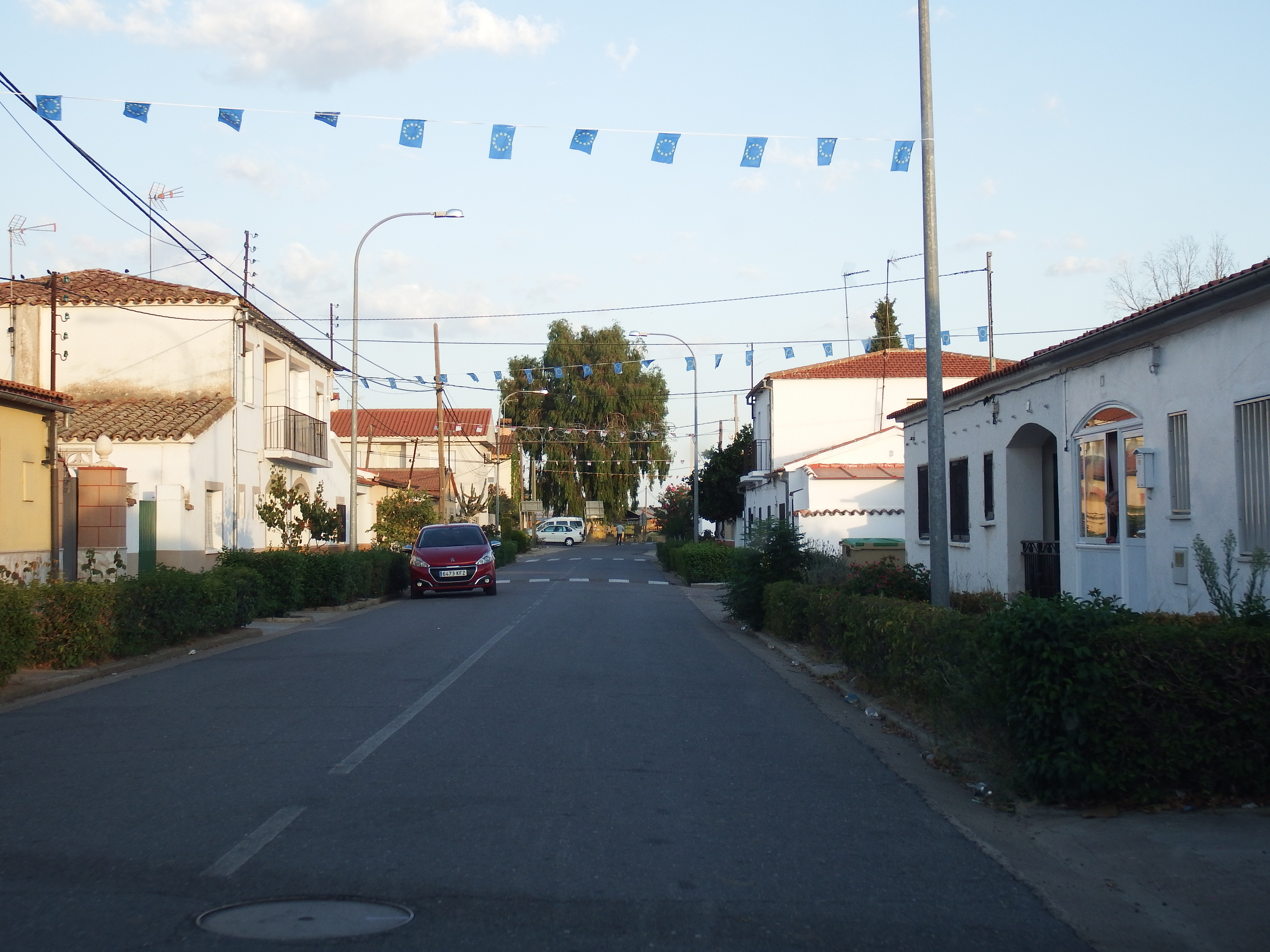 El Bercial (Toledo), pedanía de Alcolea de Tajo